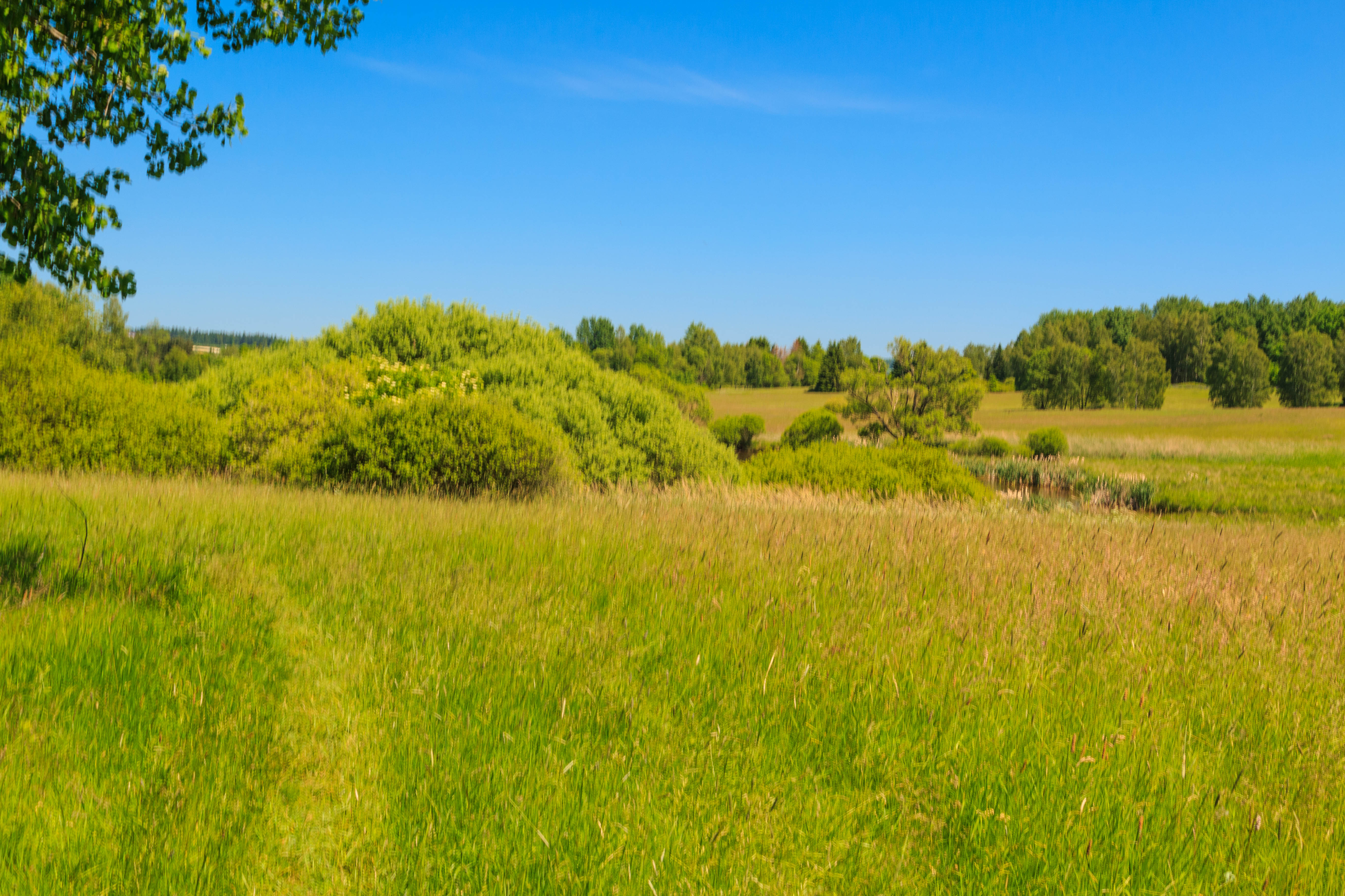 Přírodní rezervace Niva Doubravy Project: Chráněná území.